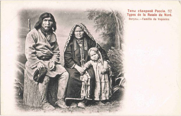 Carte postale. Phototypie Scherer, Nabholz & Co, Moscou. Types de la Russie du Nord. 82. Famille de Vogules.